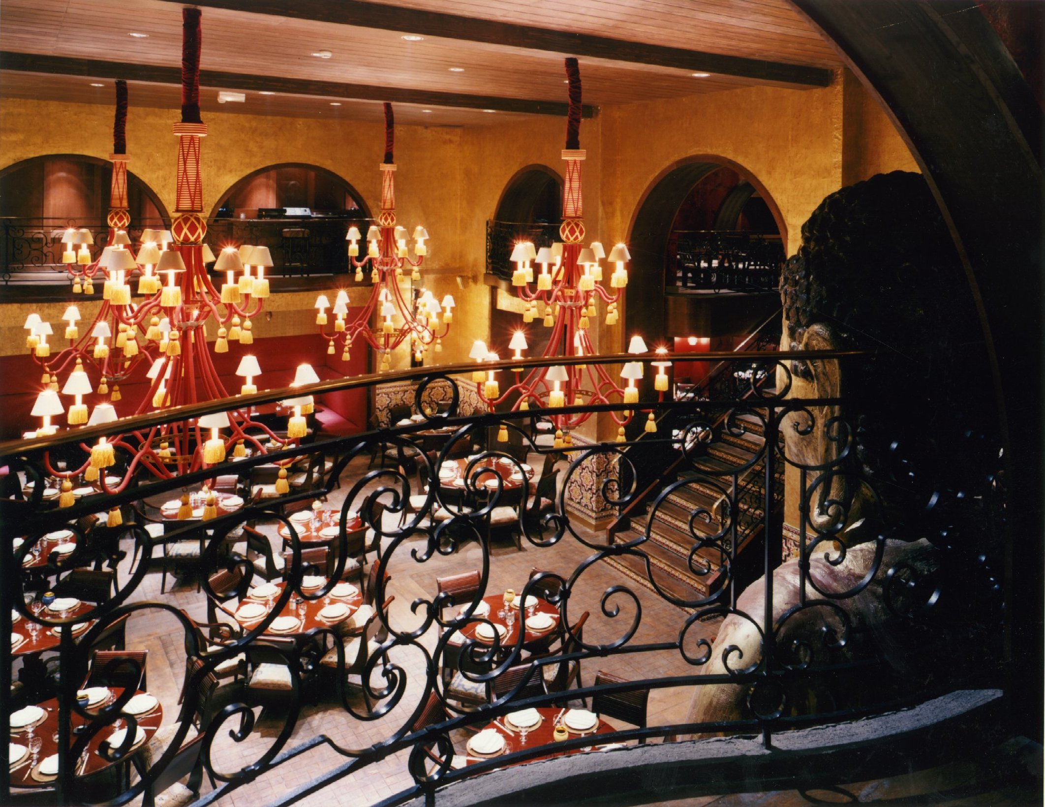 Restaurant - Bar - à Paris